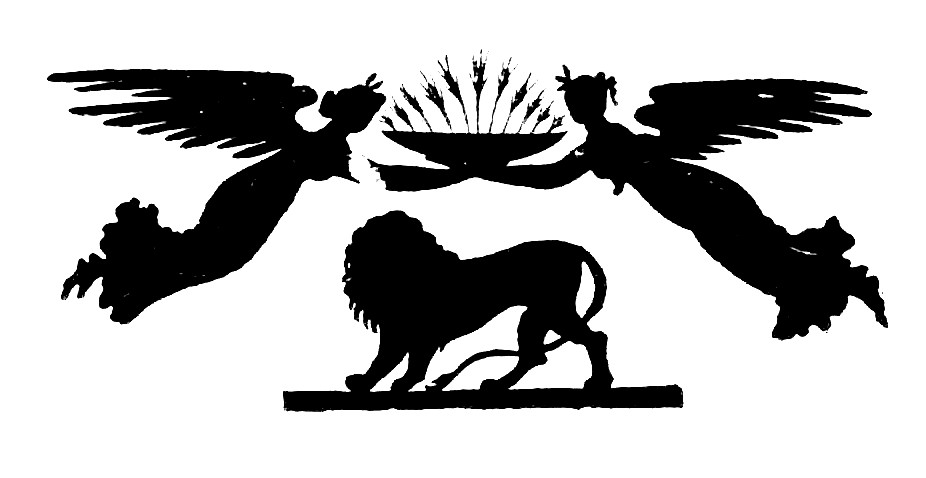 Luise Duttenhofer / Holzschnitt: Johann Wilhelm Gottlieb Pfnor: Ode an Kronprinz Wilhelm I. von Württemberg (1821), schwarzer Scherenschnitt, Eingangsvignette für das Gedicht „Ode auf Seine Königliche Hoheit den Kronprinzen von Würtemberg“ aus dem Gedichtband „Lautentöne“ von Christian Gottlob Vischer. Zwei schwebende Schutzengel halten eine Schale mit Siegespalmen über einen Löwen, das Wappentier Württembergs. Die Ode entstand im Dezember 1813, als der spätere württembergische König Wilhelm I. als Oberbefehlshaber des württembergischen Heers gegen Napoleon zu Felde zog und in mehreren Schalchten zwischen Januar und März 1814 zu dessen Niederlage und Abdankung beitrug.